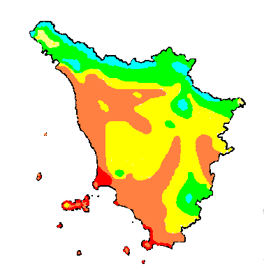 Carta della temperatura media annua in Toscana (1961-1990) 16 °C